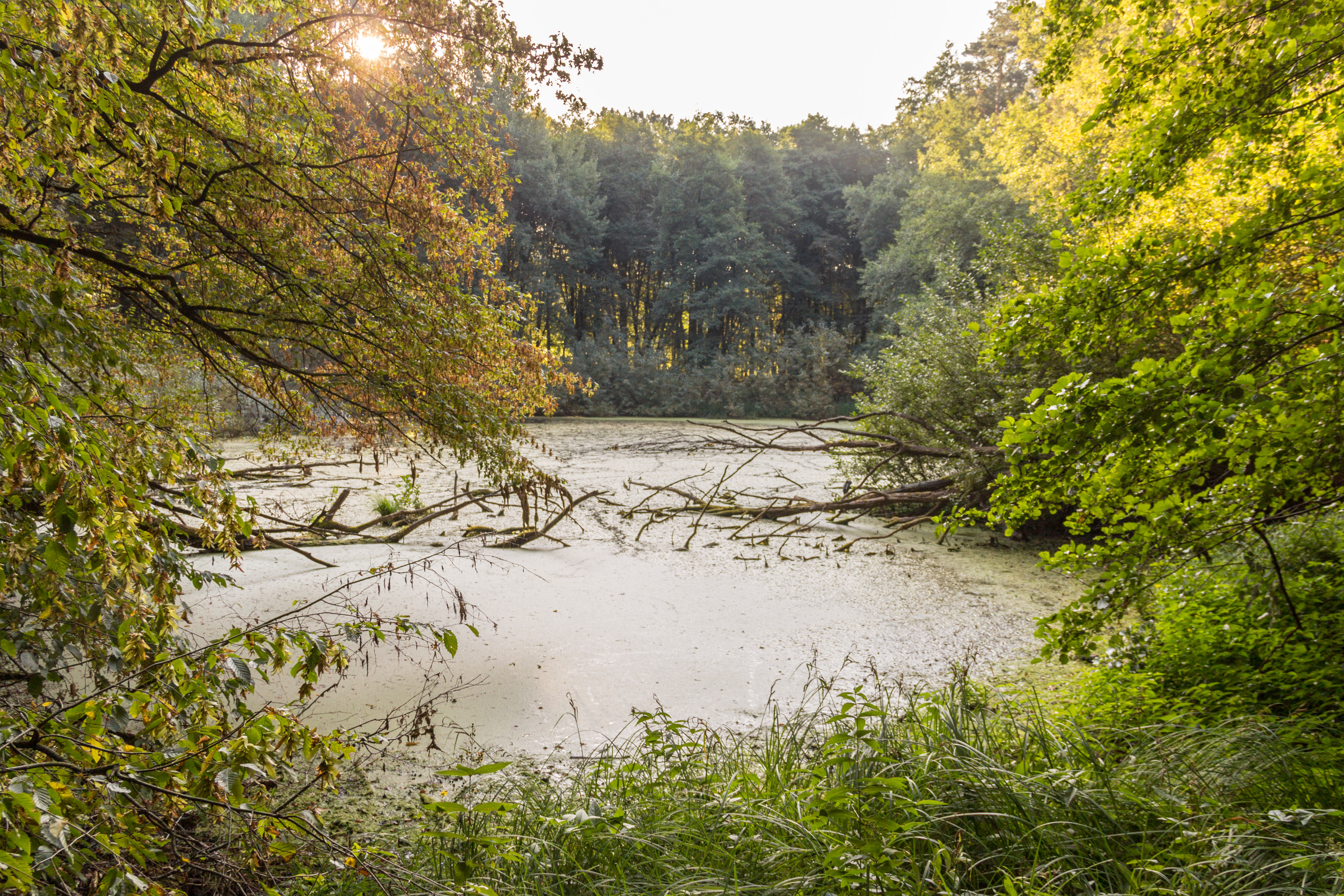 Oberer Egelsee, Naturdenkmal, Winkelhaid (gemeindefreies Gebiet)